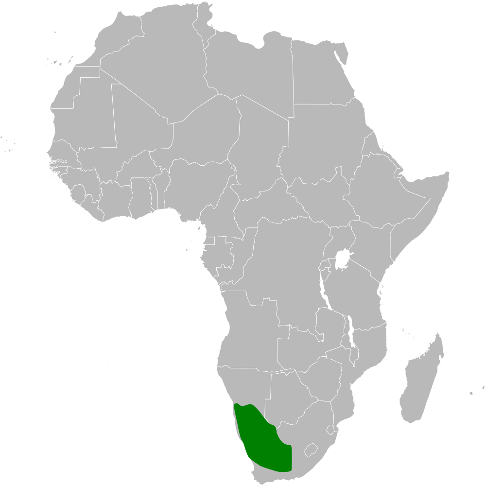 Eremopterix australis distribution map based on